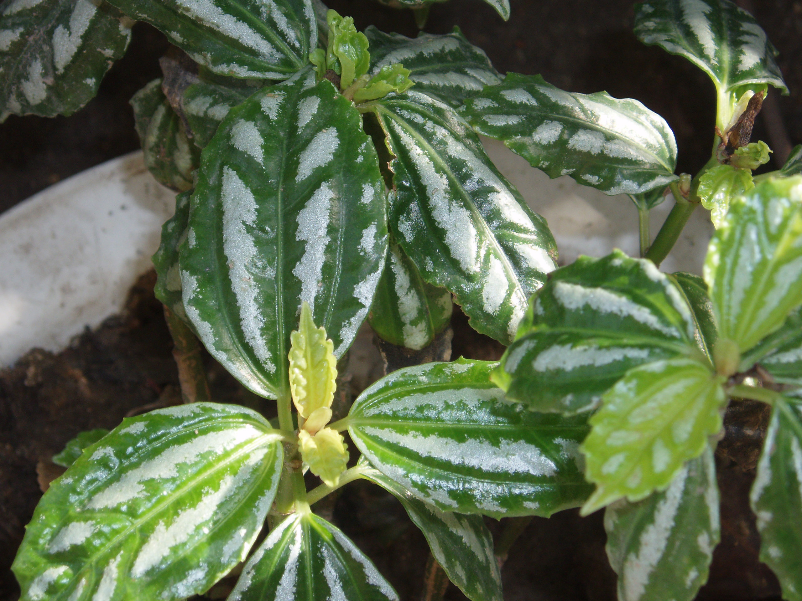 Aluminum plant